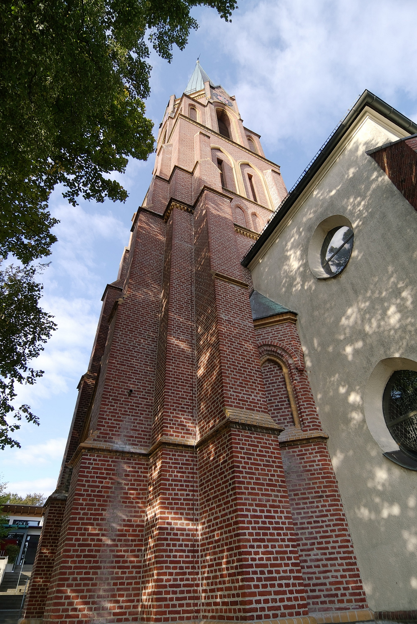 Fröndenberg an der Ruhr, Nordrhein-Westfalen, Turm katholische Kirche